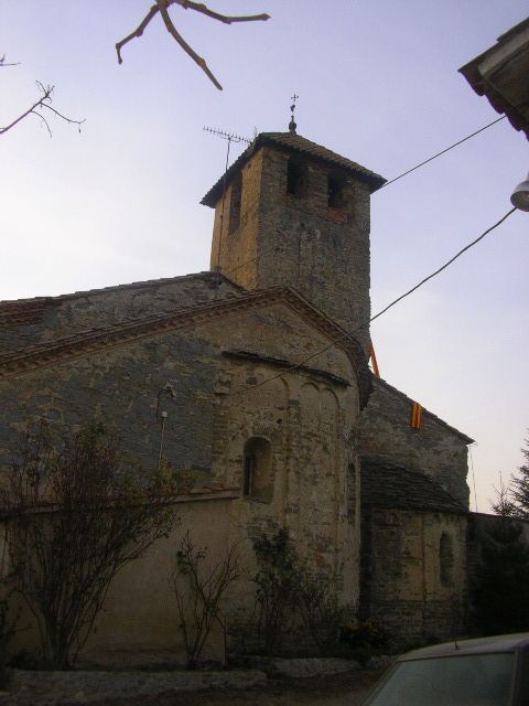 Iglesia de Sant Martí Sescorts-2